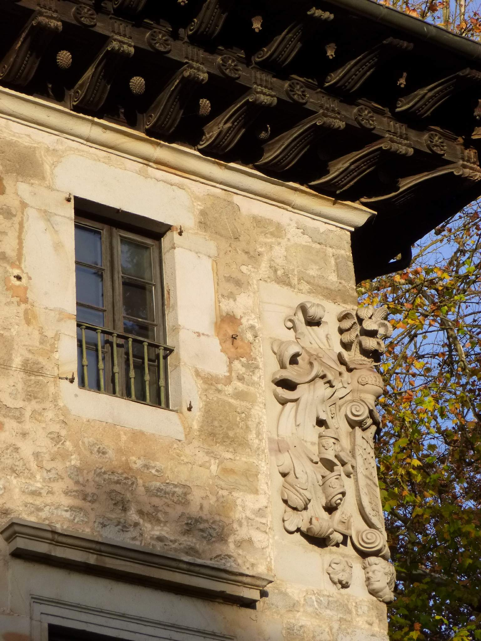 Errotalde jauregia (edificio y entorno natural), en Bergara, Gipuzkoa